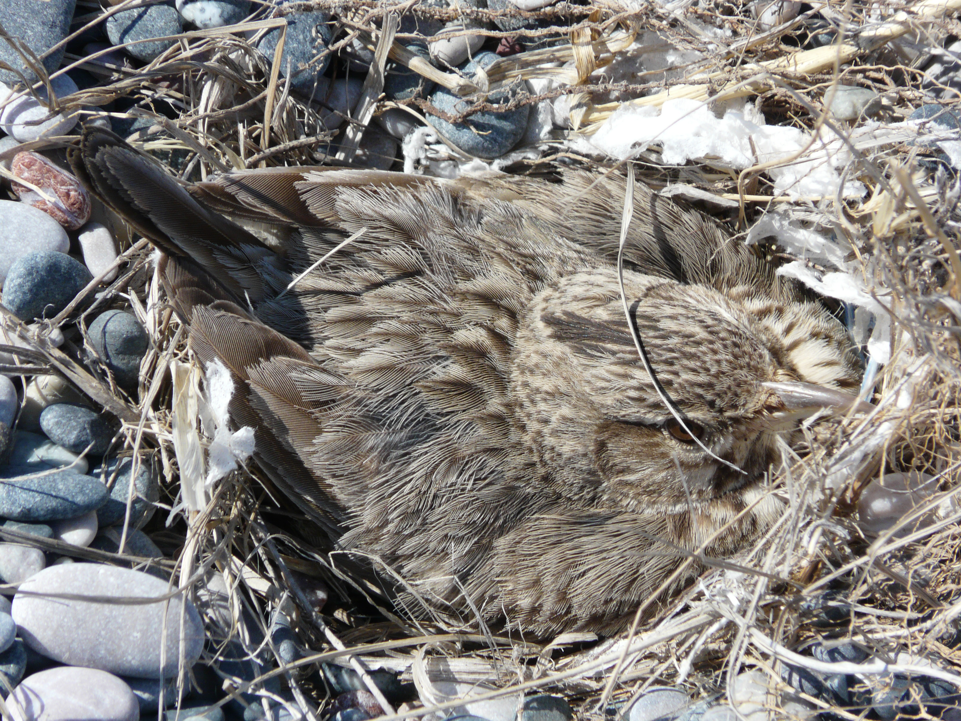 Rhodes